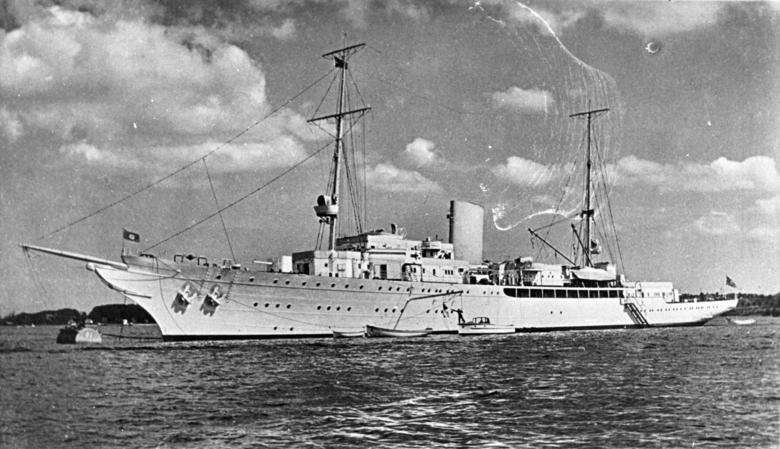 Staatsjacht Aviso "Grille" Aviso "Grille" [Aviso "Grille" II (Staatsyacht) in einer Bucht ankernd. Ansicht der Backbordseite] Information added by Wikimedia users.